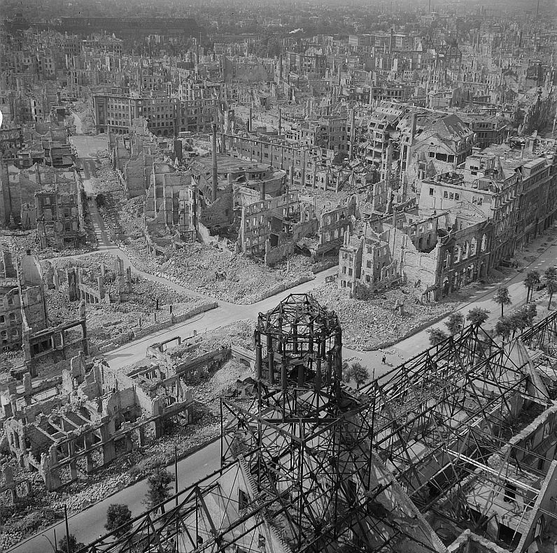 Original image description from the Deutsche FotothekBlick vom Turm des Neuen Rathauses